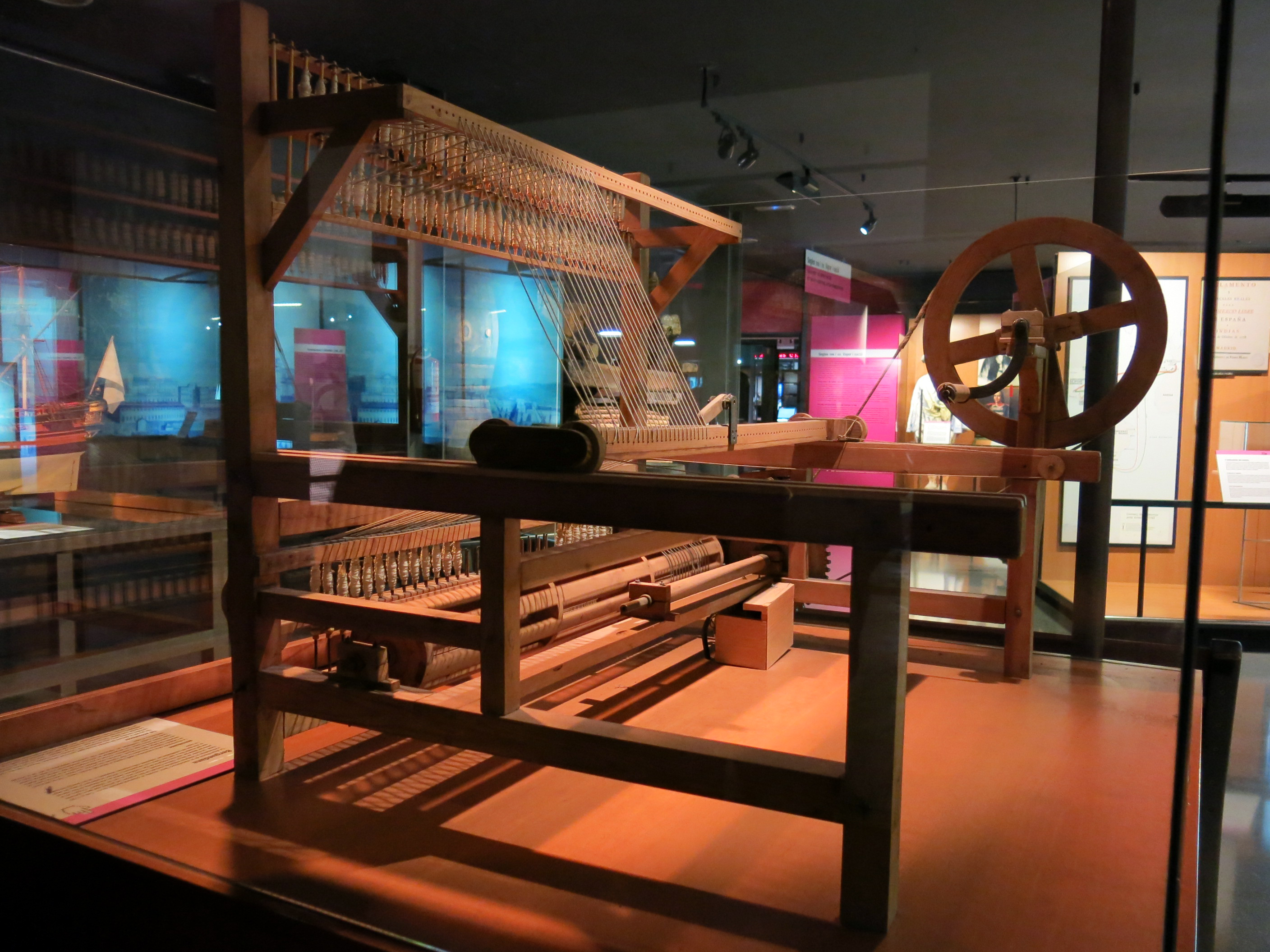 Magatzems generals del Dipòsit (Barcelona). Inclouen el Museu d'Història de Catalunya